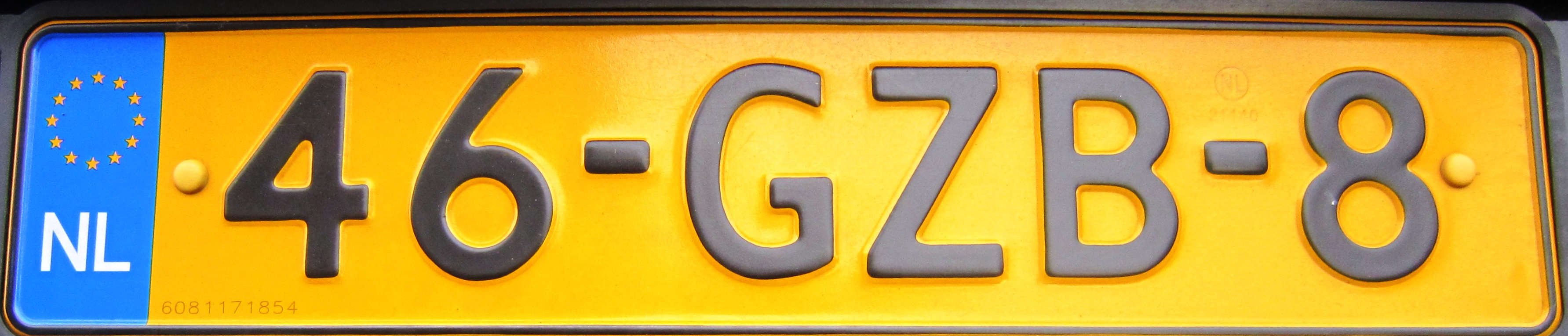 Kentekenplaat van Nederland